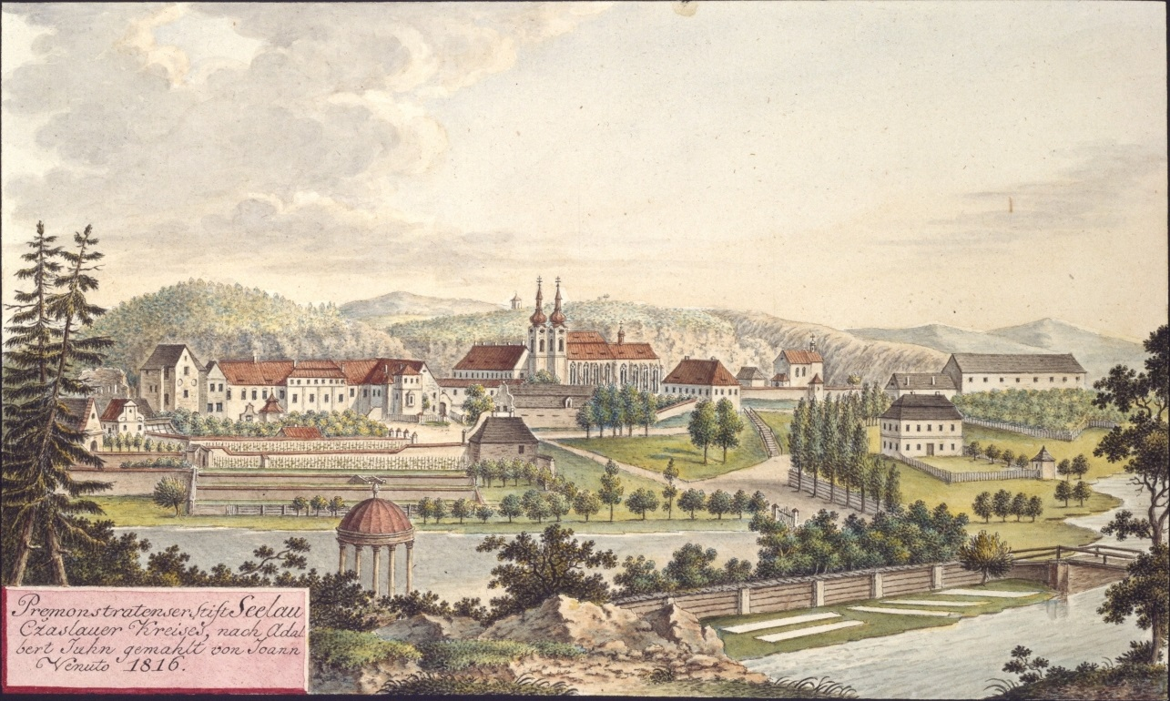 Želivský Klášter Premonstratenser Stift Seelau Czaslauer Kreises, nach Adalbert Juhn gemahlt von Joann Venuto 1816